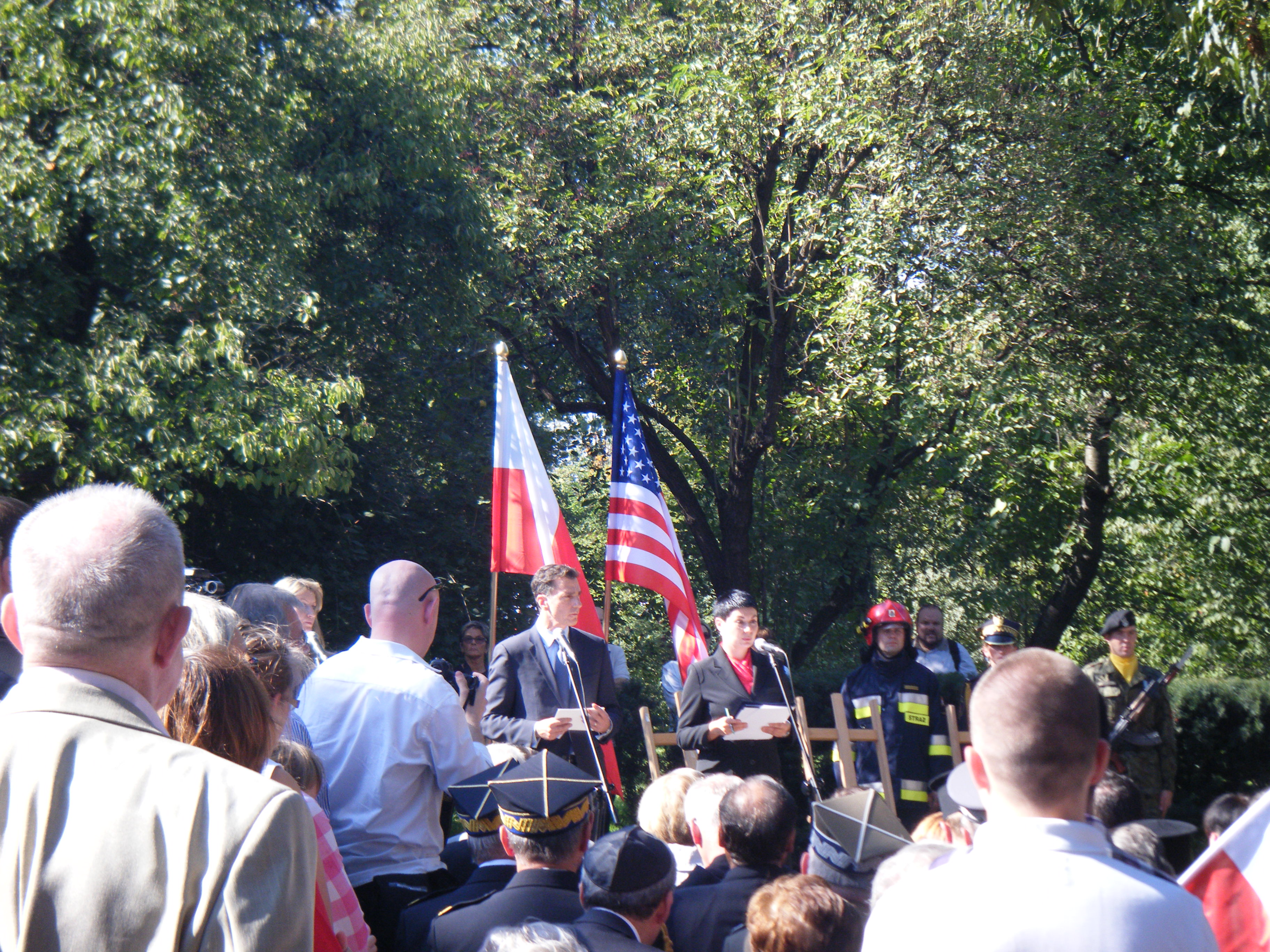 Uroczystości w 10. rocznicę zamachów z 11 września 2011 roku. Park Skaryszewski im. Ignacego Jana Paderewskiego w Warszawie, pomnik ofiar zamachu na WTC. Przemówienie Lee A. Feinsteina, Ambasadora Stanów Zjednoczonych w Polsce.